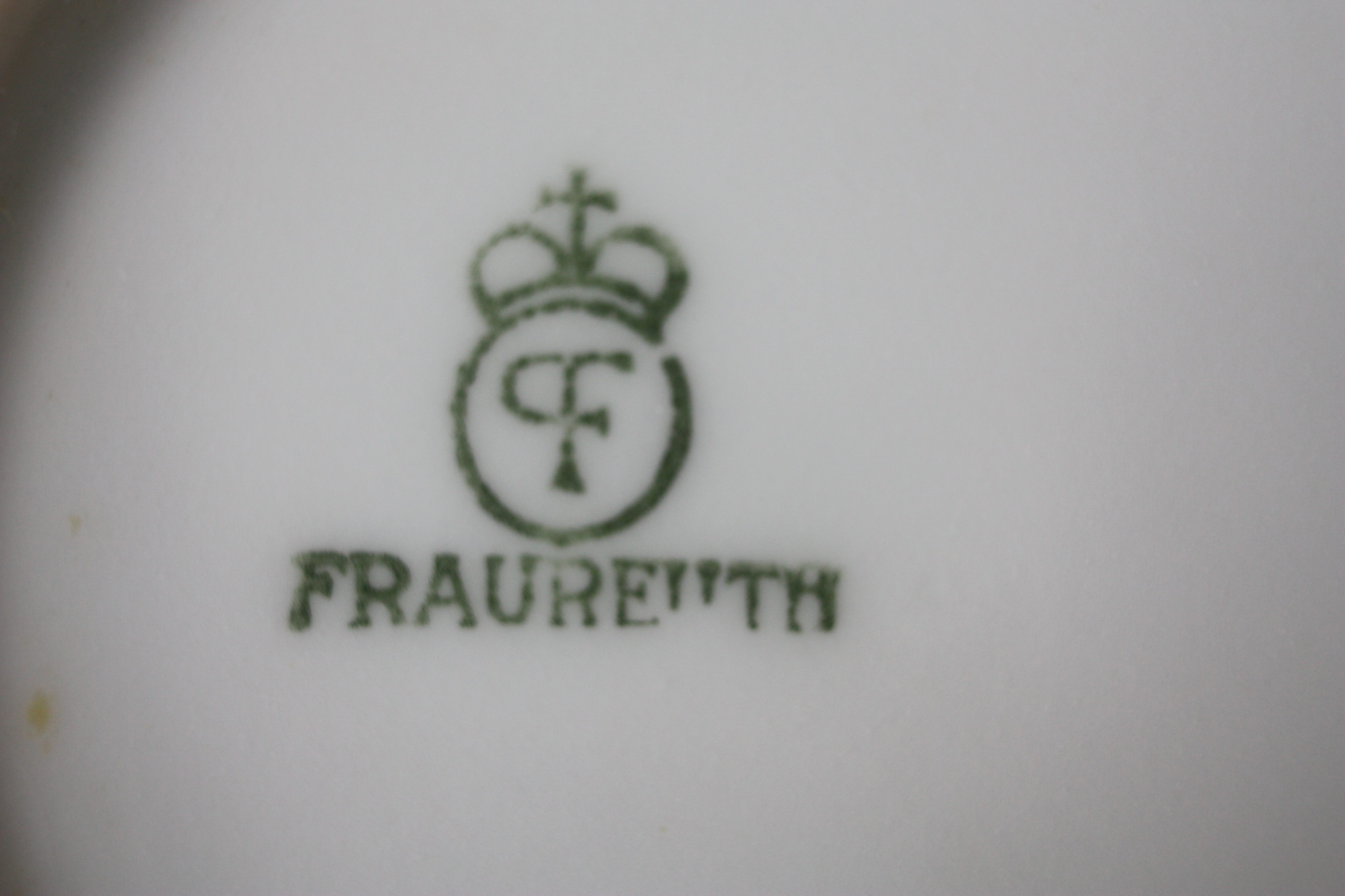 Porzellanfabrik Fraureuth, Germany